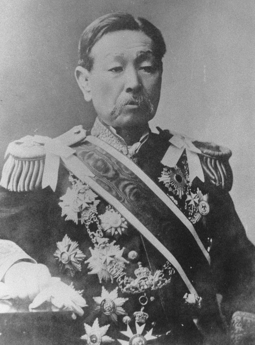 Portrait of Inoue Kaoru (井上馨, 1836 – 1915)